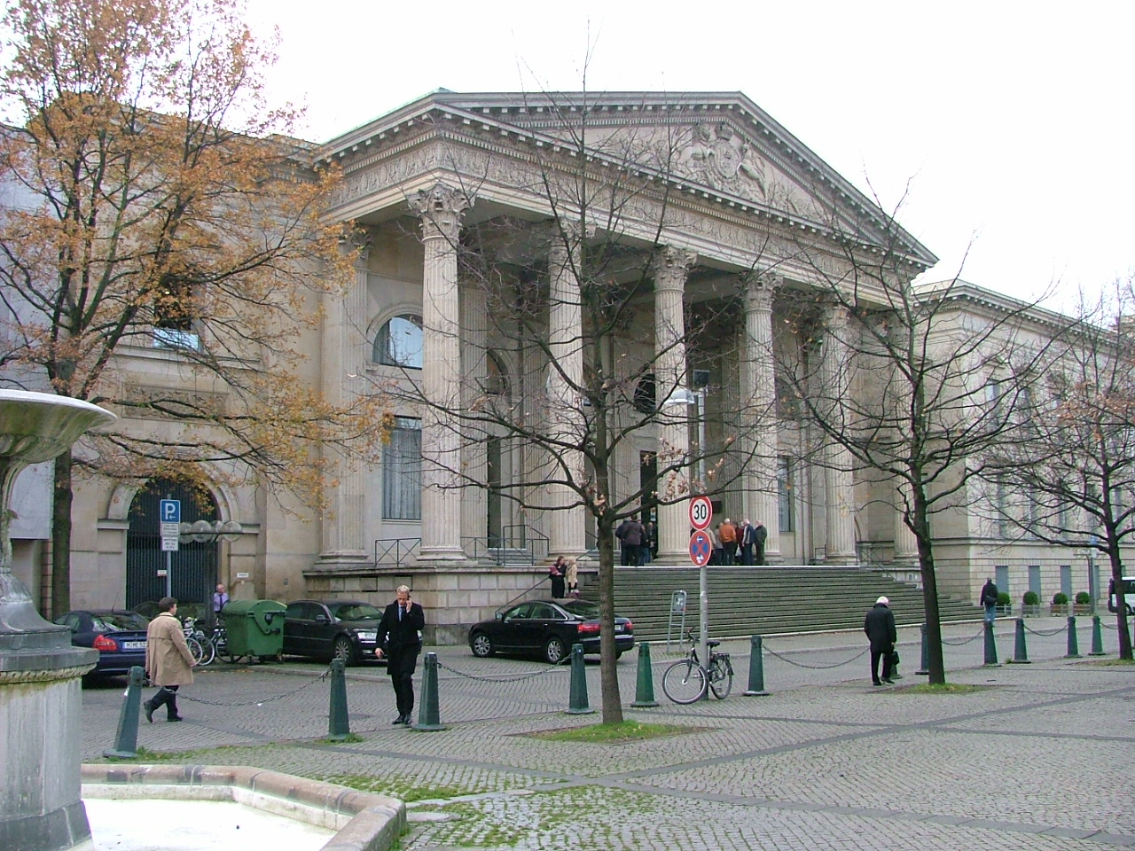 Gebäude des Landtages von Niedersachsen in Hannover